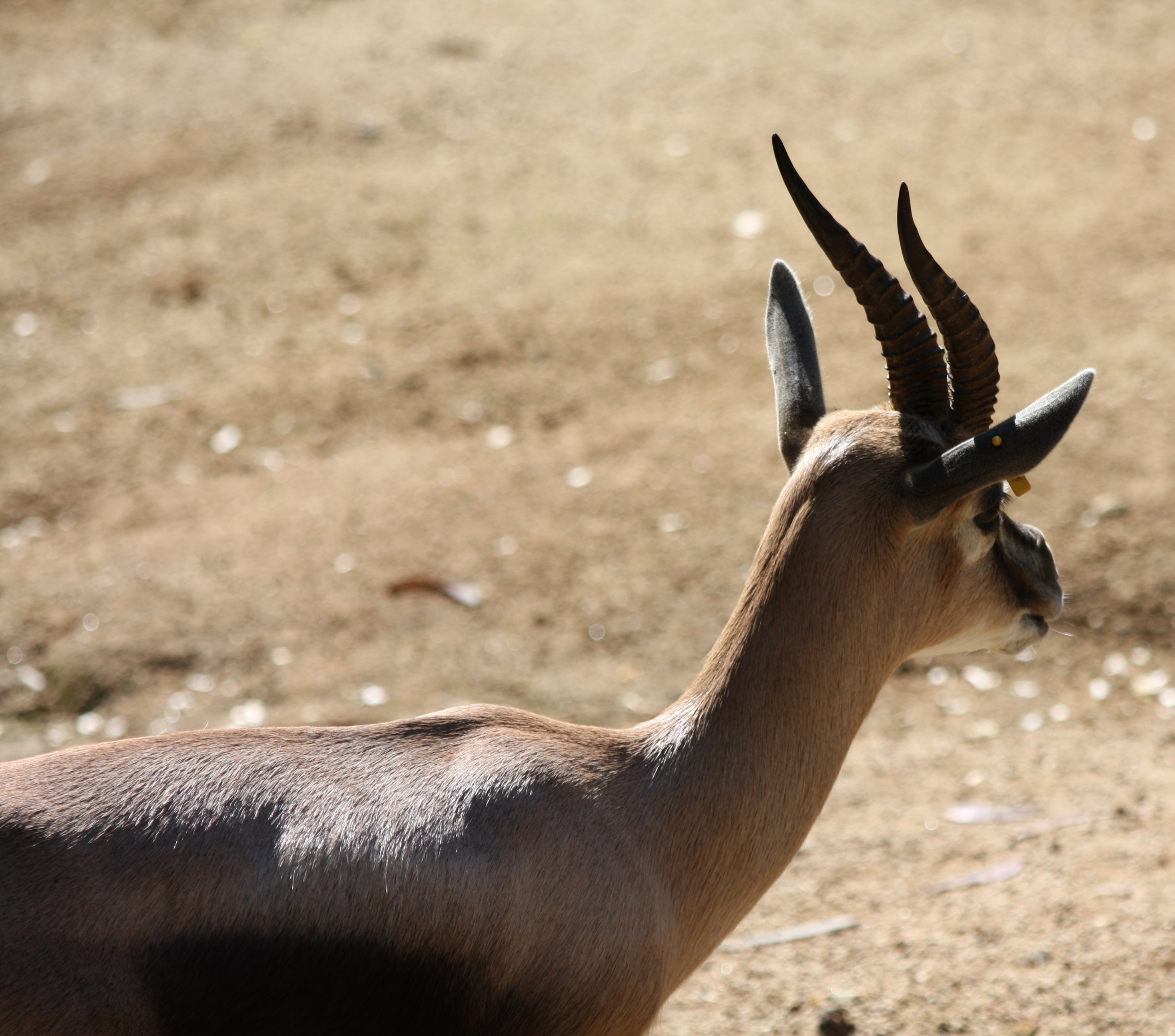 Male Speke's Gazelle (Gazella spekei)